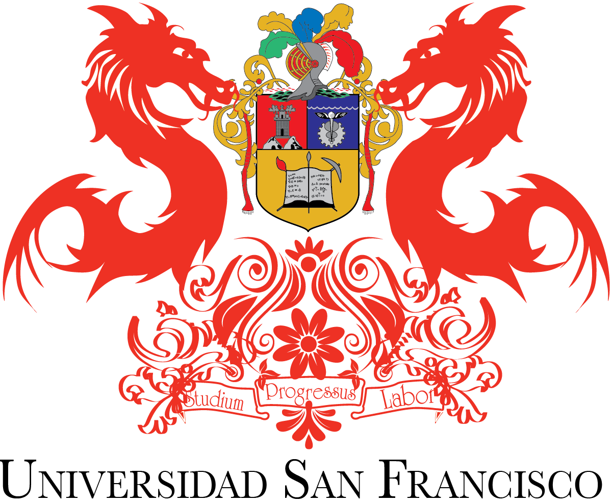 Escudo de la Universidad